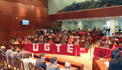 Unión General de Trabajadores del Ecuador de todos los sectores del país, solicitaron la intervención de la Comisión Legislativa y de Fiscalización